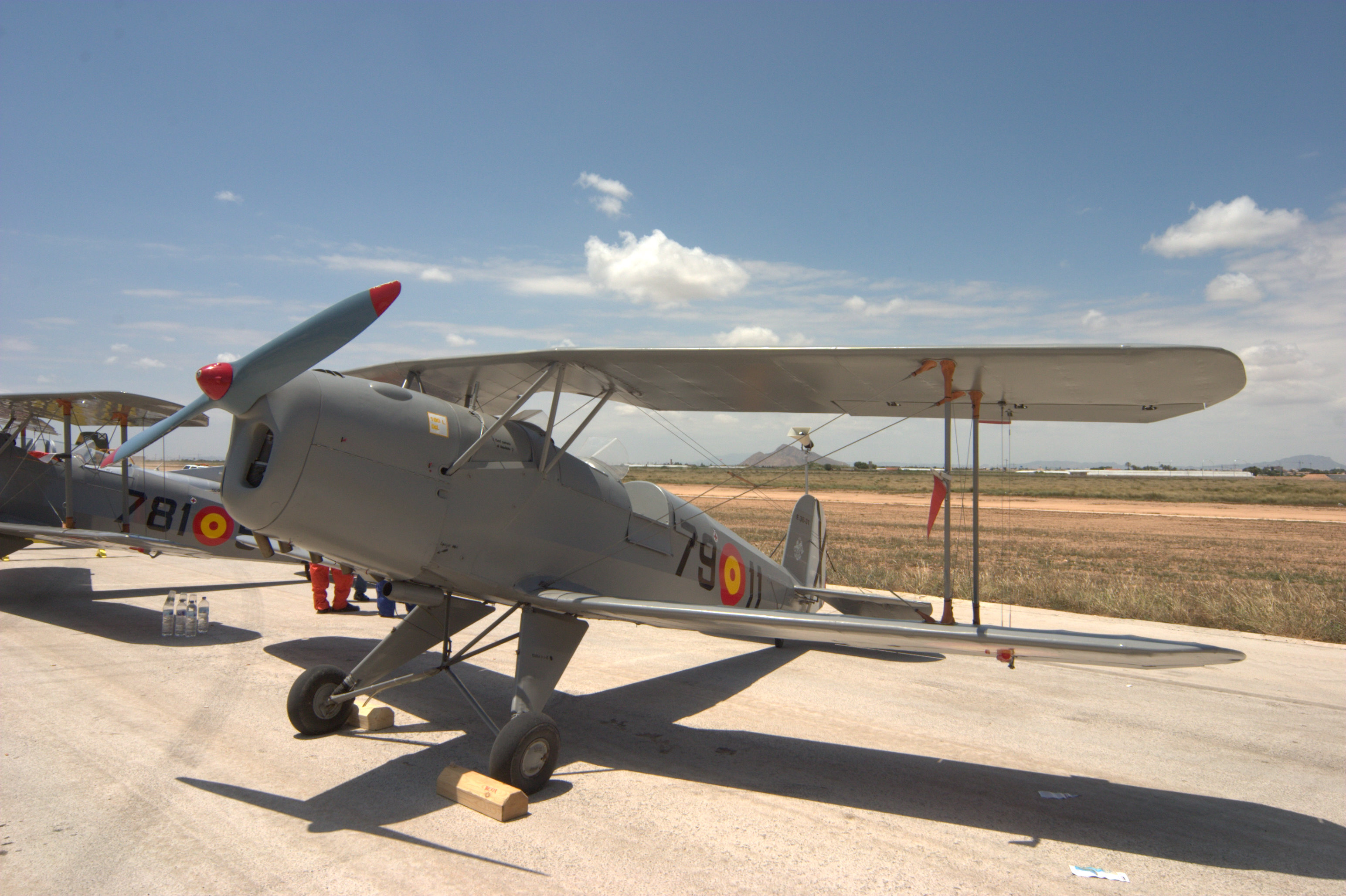 CASA 1131 Jungmann (Bücker 131 Jungmann) Fundación Infante de Orleans